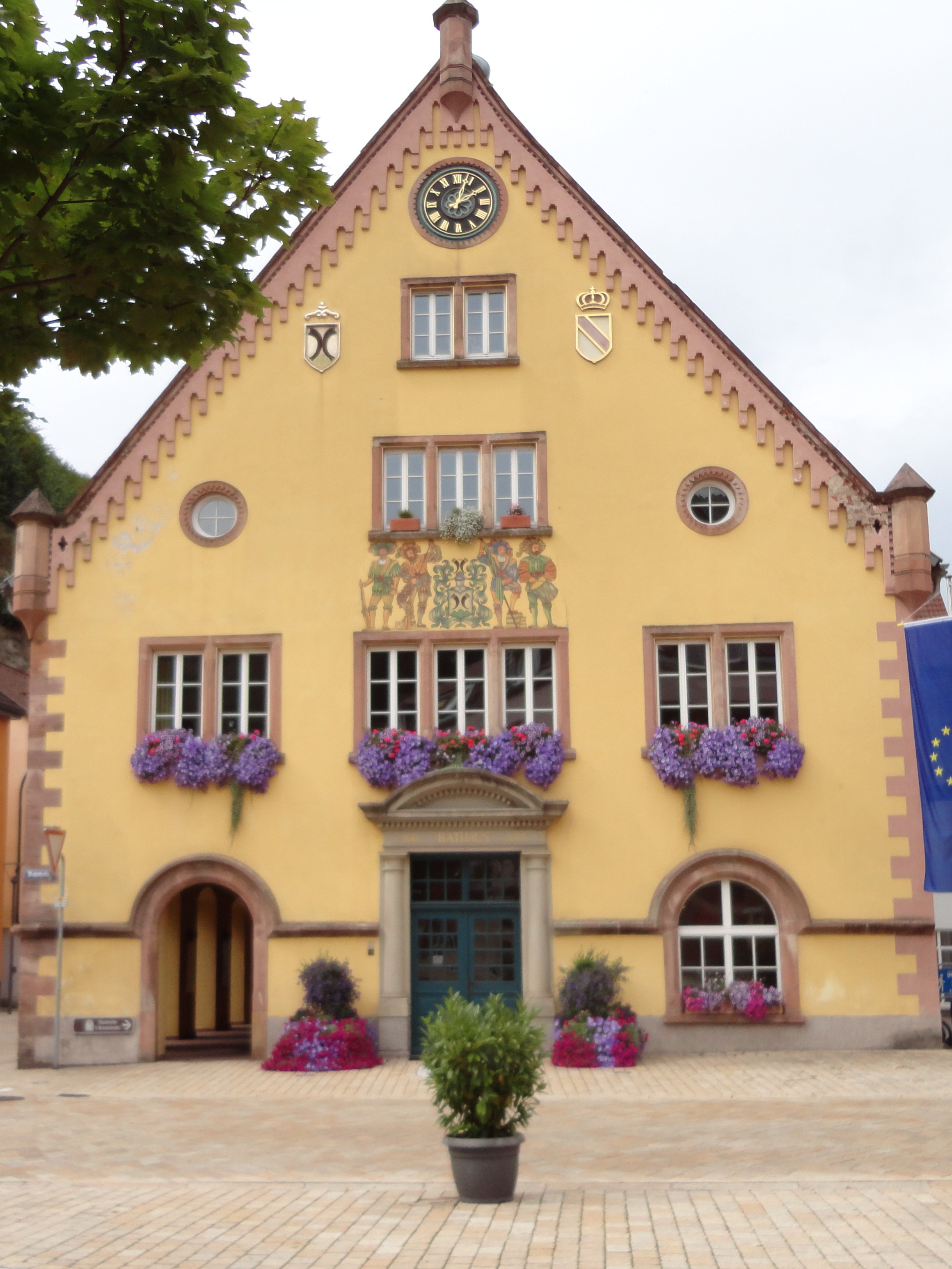 Das Rathaus in Hornberg (Schwarzwald)